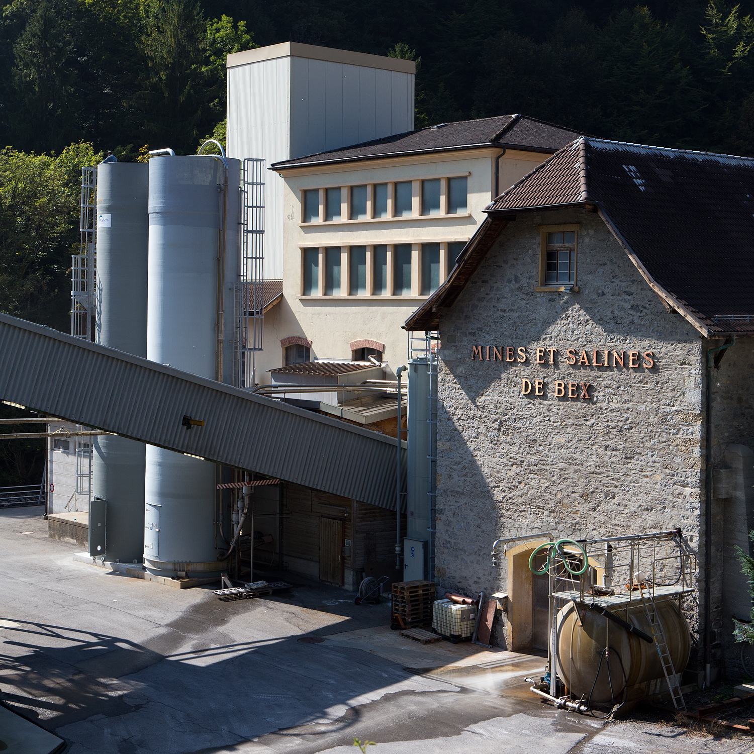 Salzbergwerk in Bex (VD)